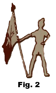 Posizione dell'alfiere assunta secondo le norme spiegate nella sezione "Cerimoniale"